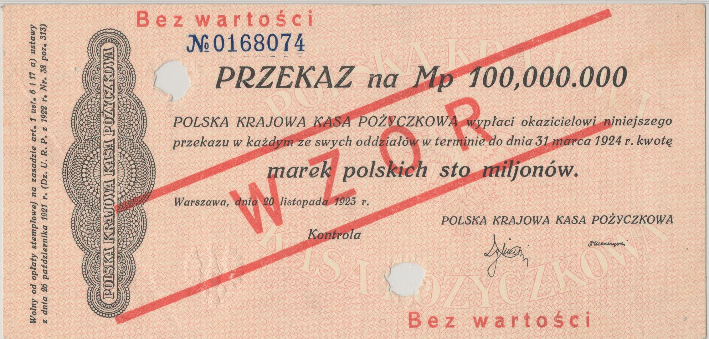 Przekaz 100000000 marek polskich 1924 WZÓR awers